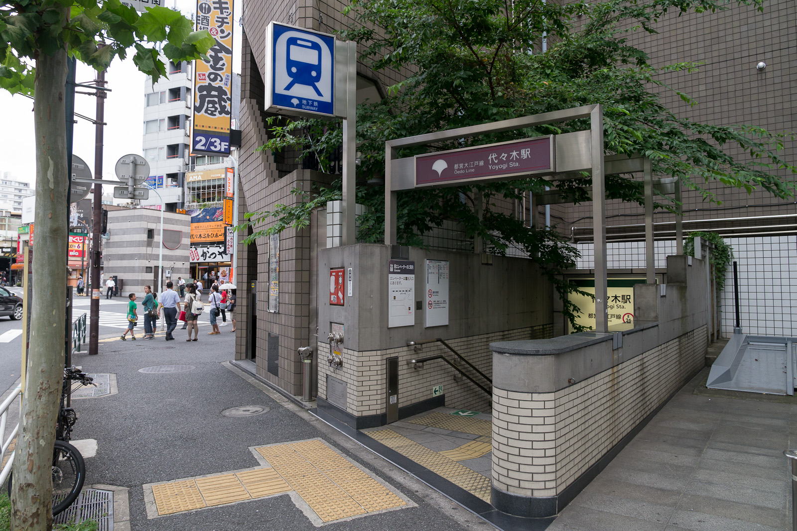 都営地下鉄大江戸線代々木駅。